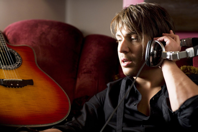 Алексей Романов на съёмках клипа Ева